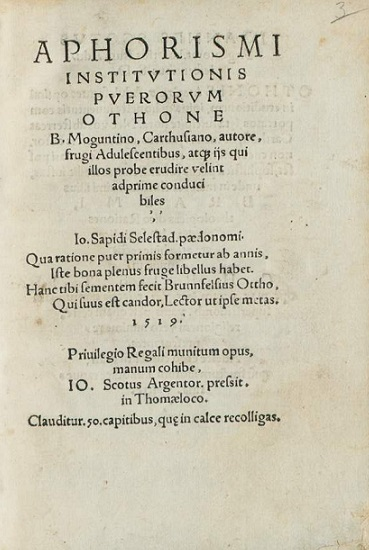 Aphorismi institutionis puerorum, Strasburgo, Schott, 1519